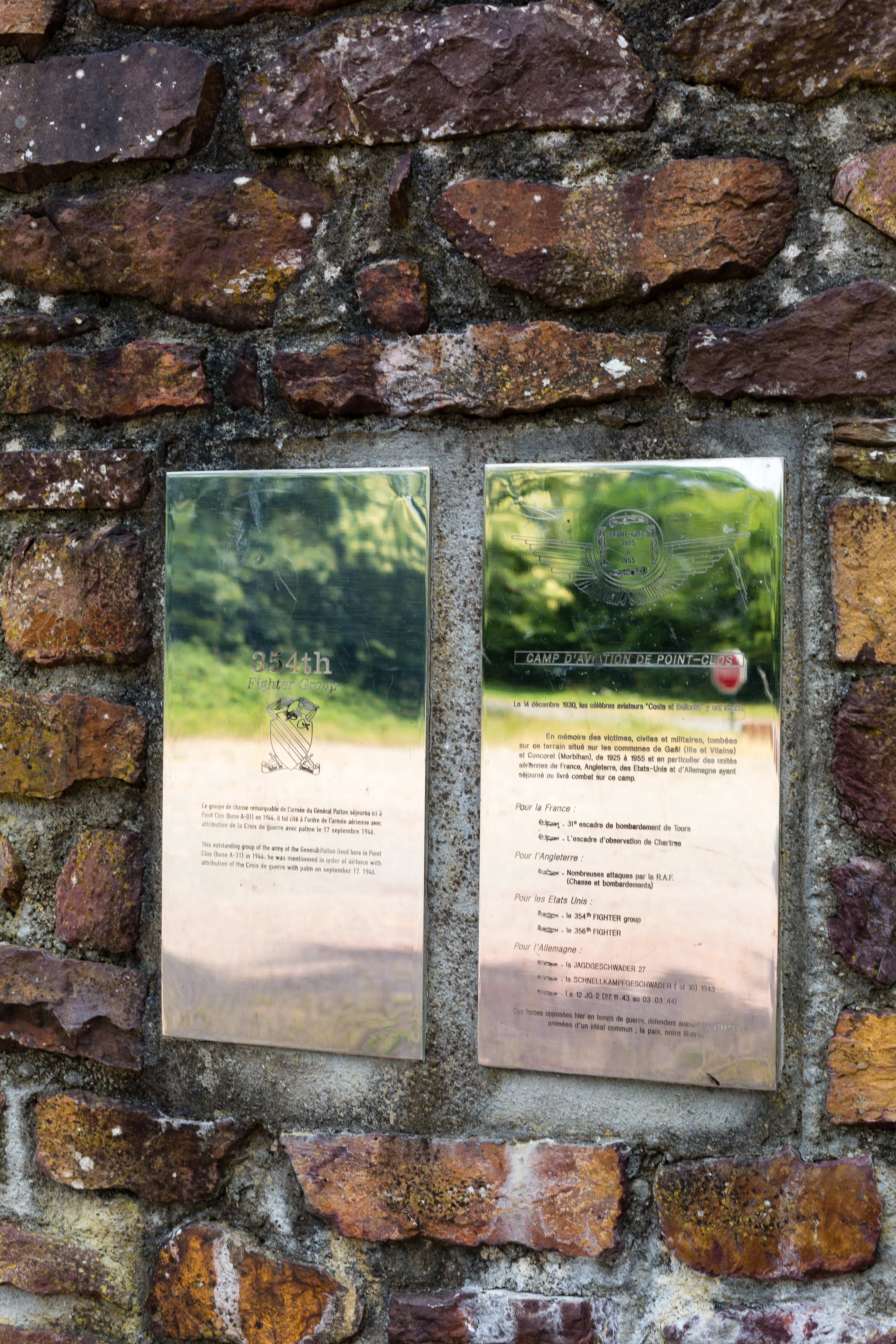 Mémorial du camp d'aviation de Point-Clos, Gaël, France